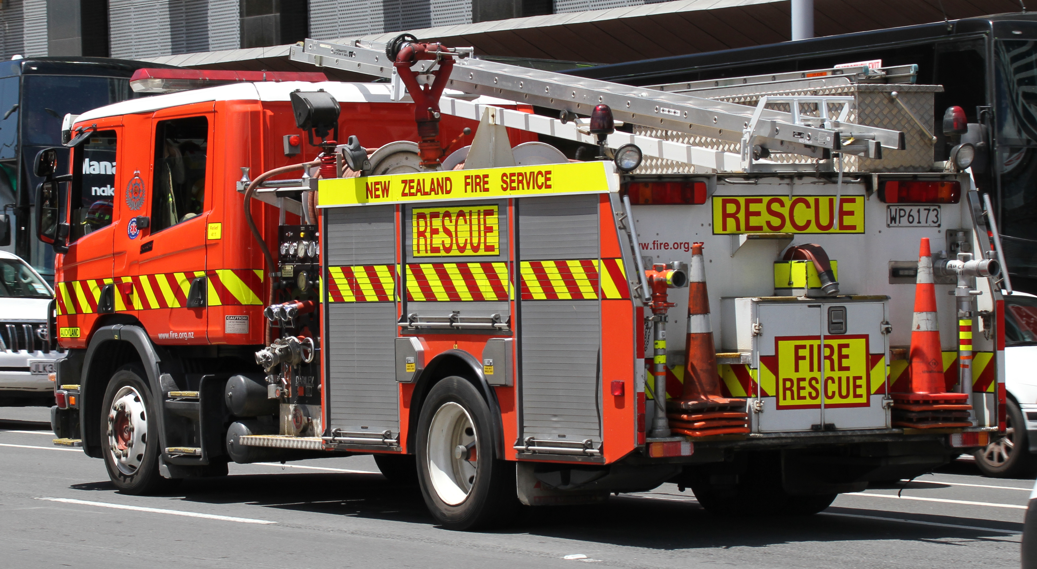 Auckland Fire Engine